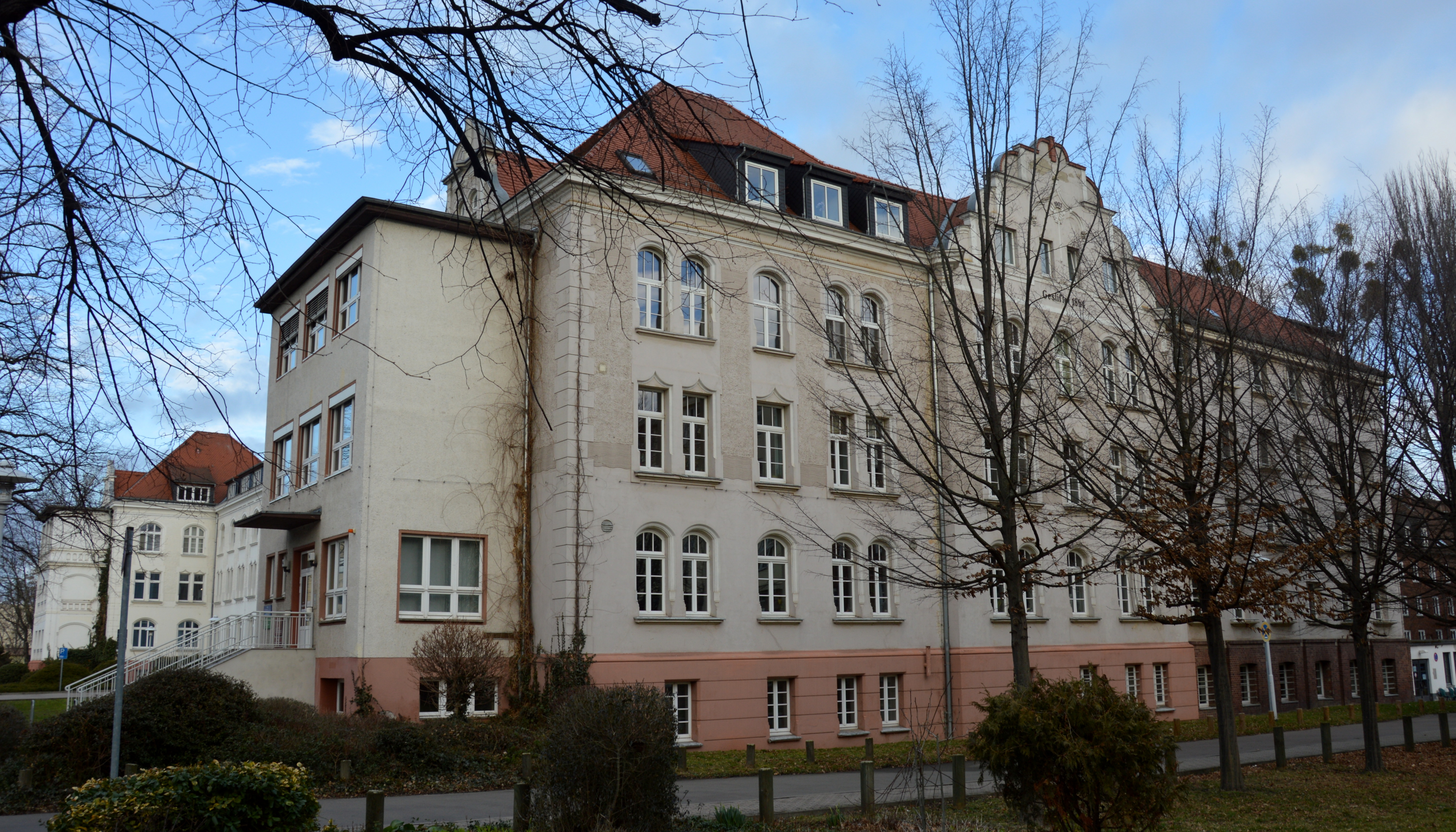 Uniklinikum Magdeburg Gebäude 14